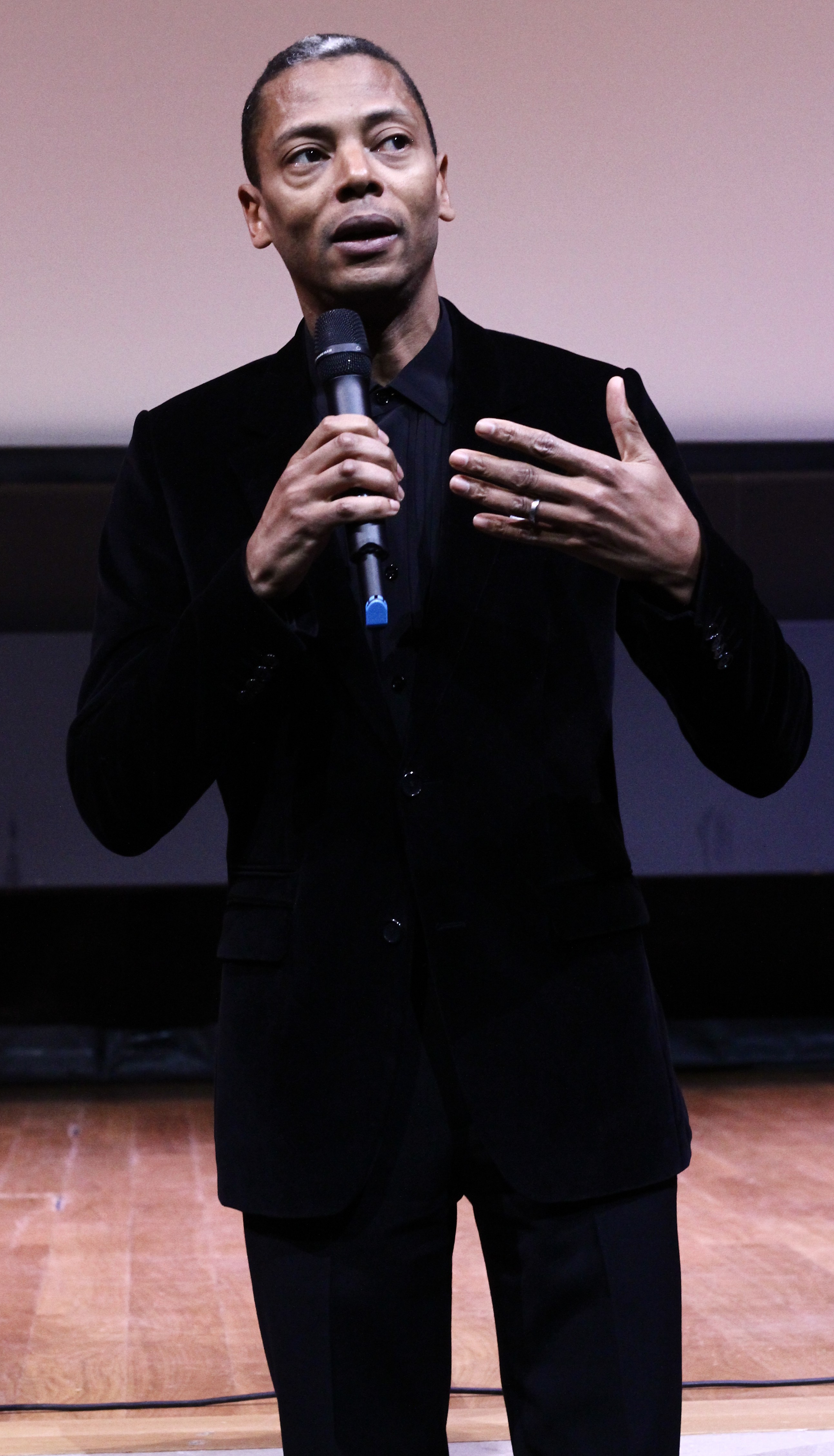 Jacqueline Caux et Jeff Mills - Man From Tomorrow à l'auditorium du Louvre.